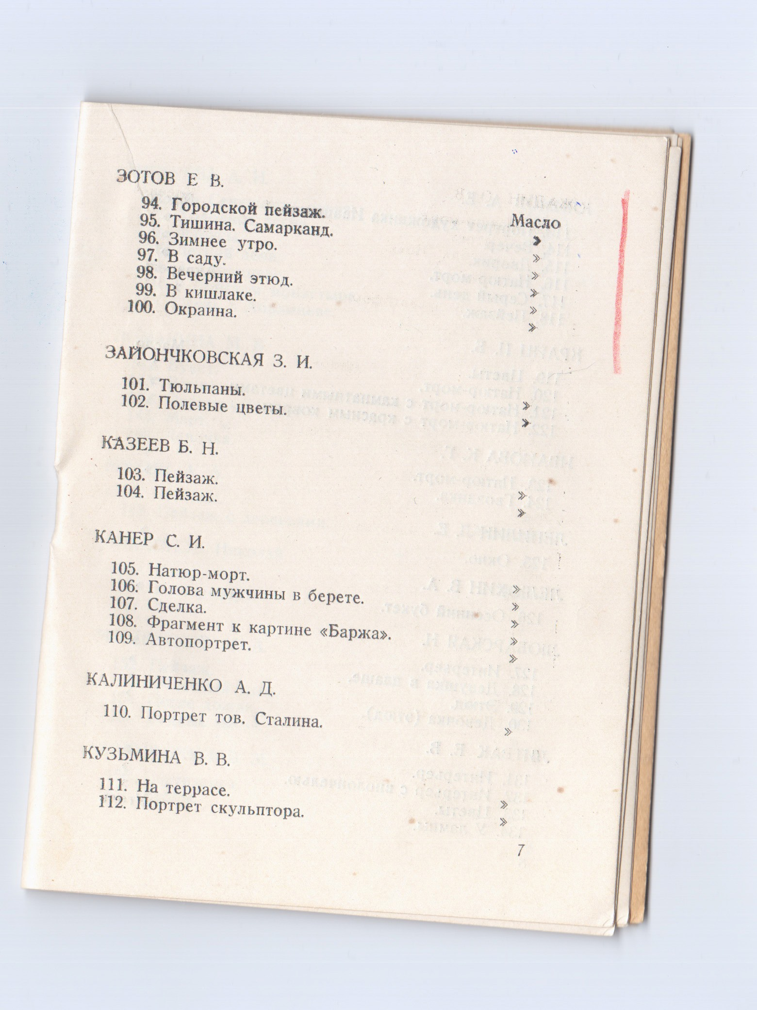 Список картин Е.В.Зотова в каталоге Выставки живописи и скульптуры в Москве, 1946